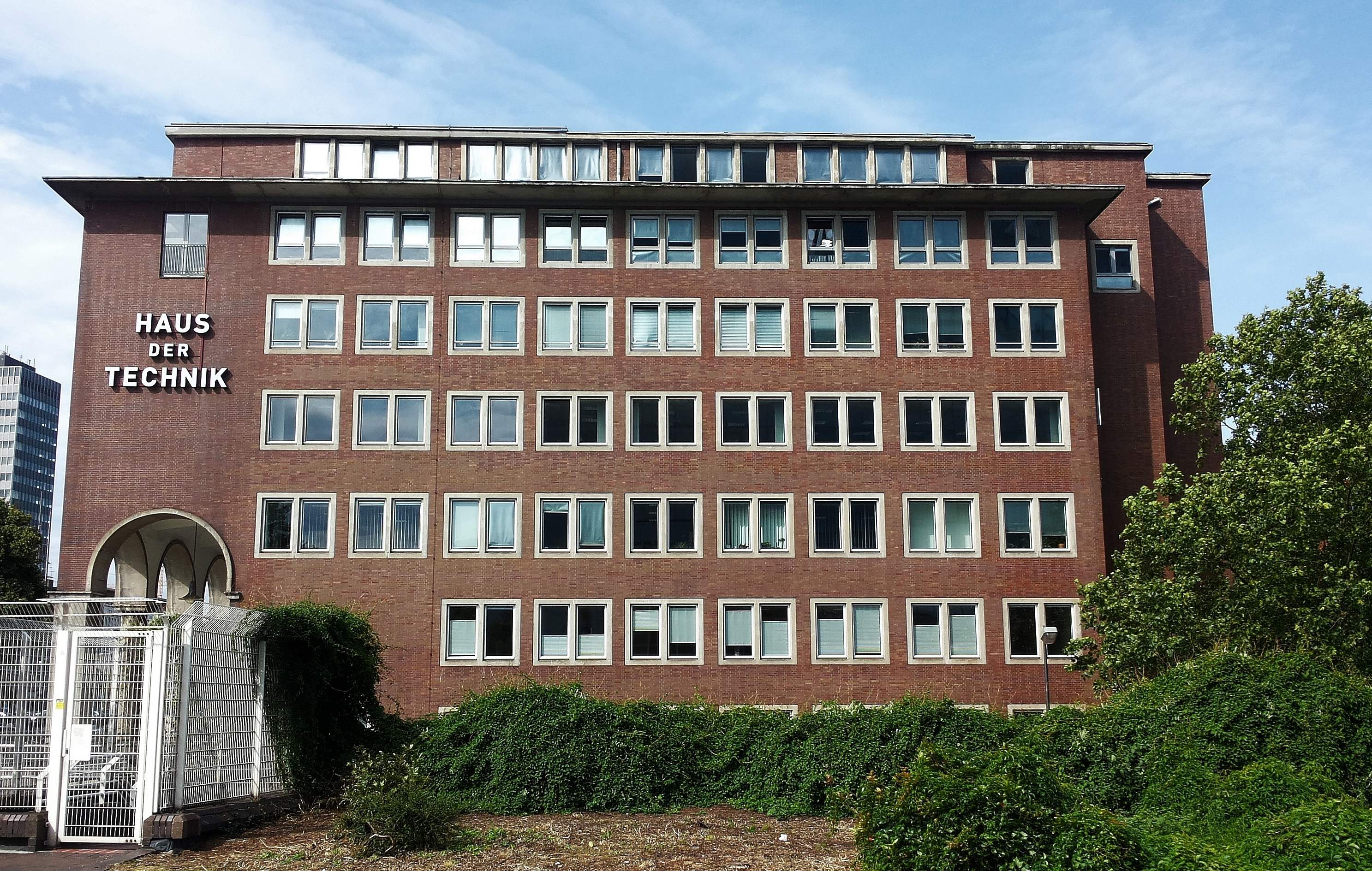 Haus der Technik in Essen (Ostansicht), Baudenkmal - Teil der Denkmalliste von Essen, Nr. 224